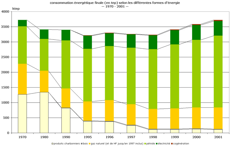 Energiekonsum zu Lëtzebuerg